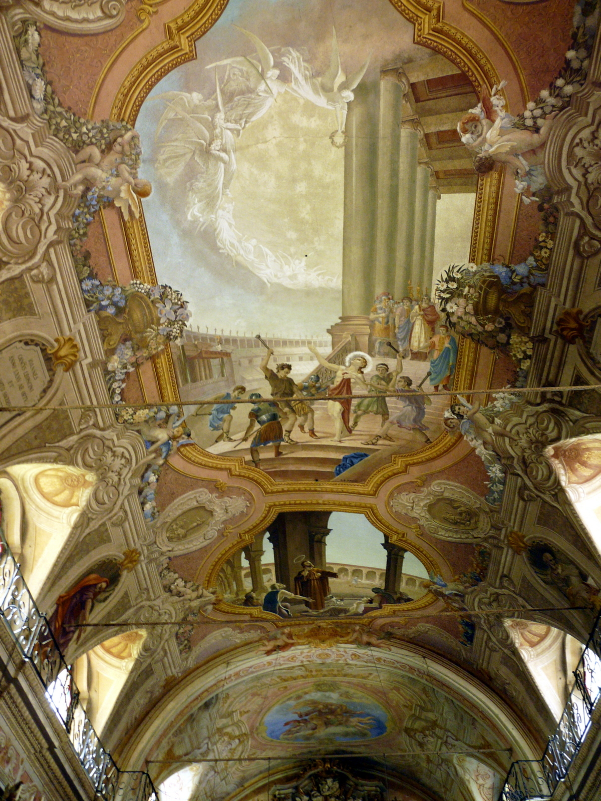 Particolare del soffitto della navata centrale, oratorio dei Santi Sebastiano e Rocco, Campo Ligure, Liguria, Italia